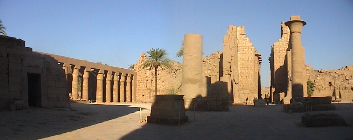 La grande cour du temple d'Amon-Rê à Karnak